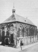 Foto der inzwischen nicht mehr existierenden Julianskapelle